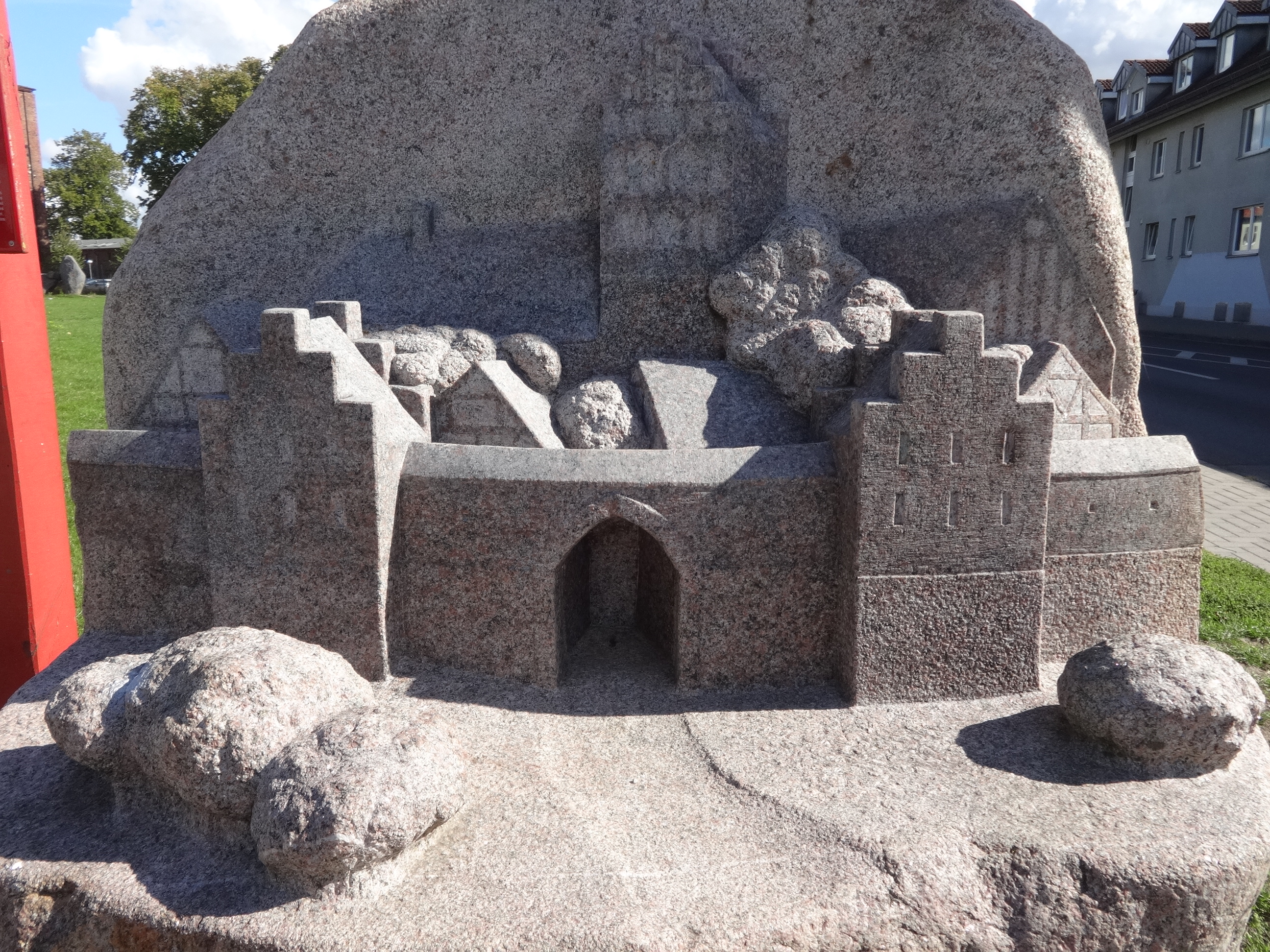 Findling mit einer Darstellung des Prenzlauer Tores, eines der vier mittelalterlichen Stadtore in Angermünde